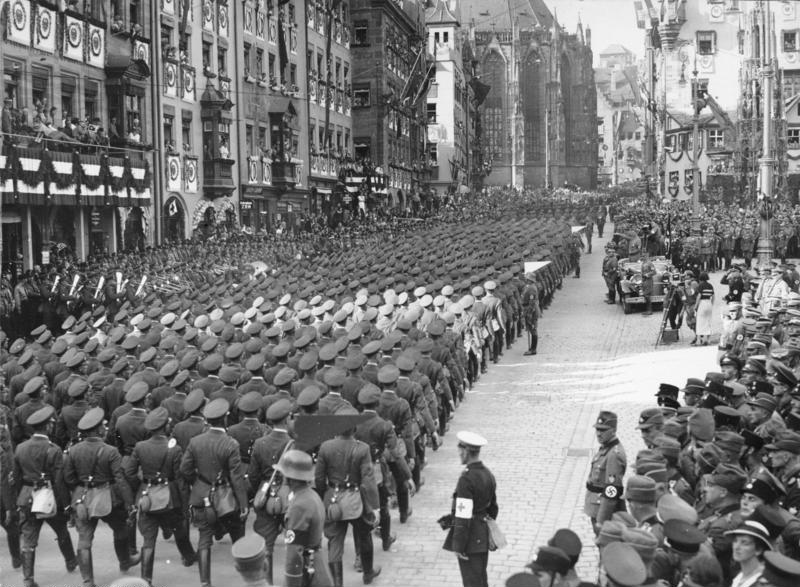 Nürnberg, Reichsparteitag, Marsch der Wehrmacht Reichsparteitag 1934. Leni Riefenstahl filmt [Nürnberg.- Reichsparteitag der NSDAP, "Reichsparteitag der Einheit und Stärke", Marsch von Wehrmachts-Soldaten durch Nürnberg, Leni Liefenstahl mit Team, filmend, 5.-10. September 1934] Abgebildete Personen: Riefenstahl, Leni: Filmproduzentin, Regisseurin, Schauspielerin, Fliegerin, Bundesrepublik Deutschland (GND 118600761)